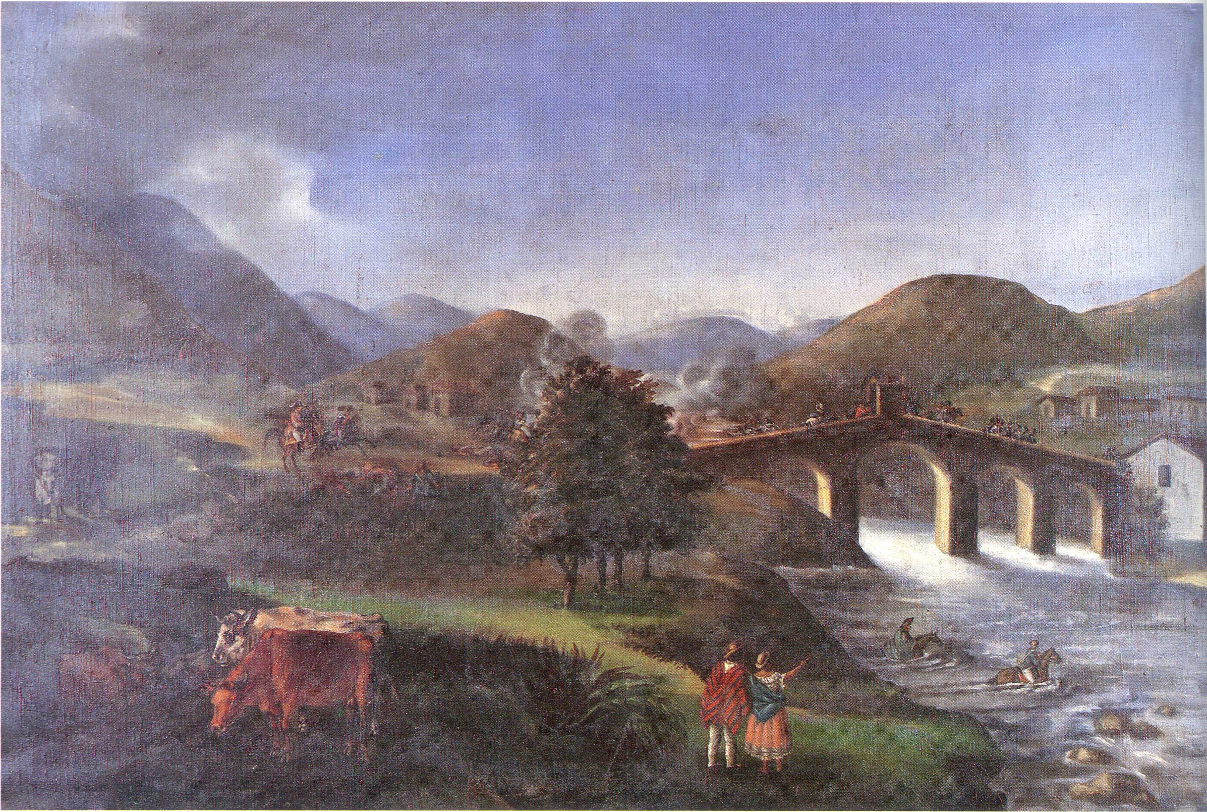 Batalla del Alto Palace